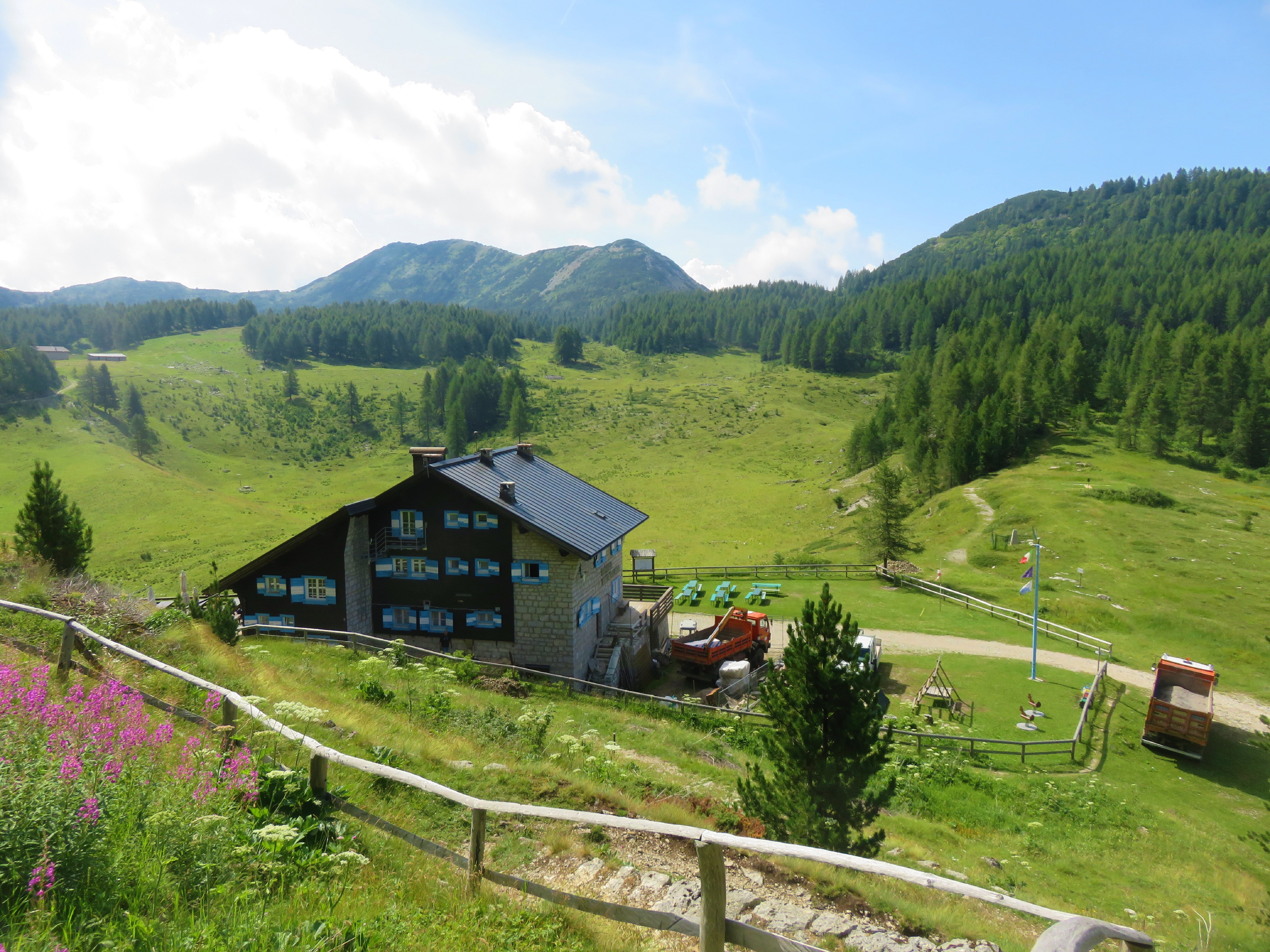 Rifugio Alpe Pozza Vincenzo Lancia. Il rifugio all'eterno, visto dalle pendici del Col Santo, vicino alla chiesetta.